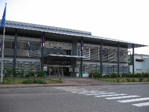 description: Nouvelle mairie de Matoury auteur : didwin